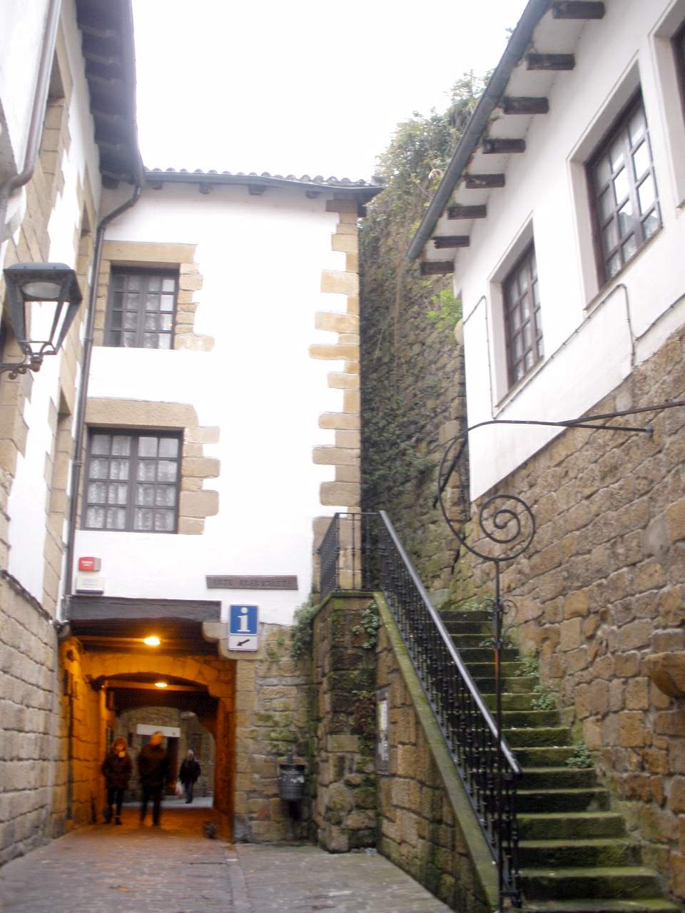 Pasajes de San Juan - Casa de Victor Hugo